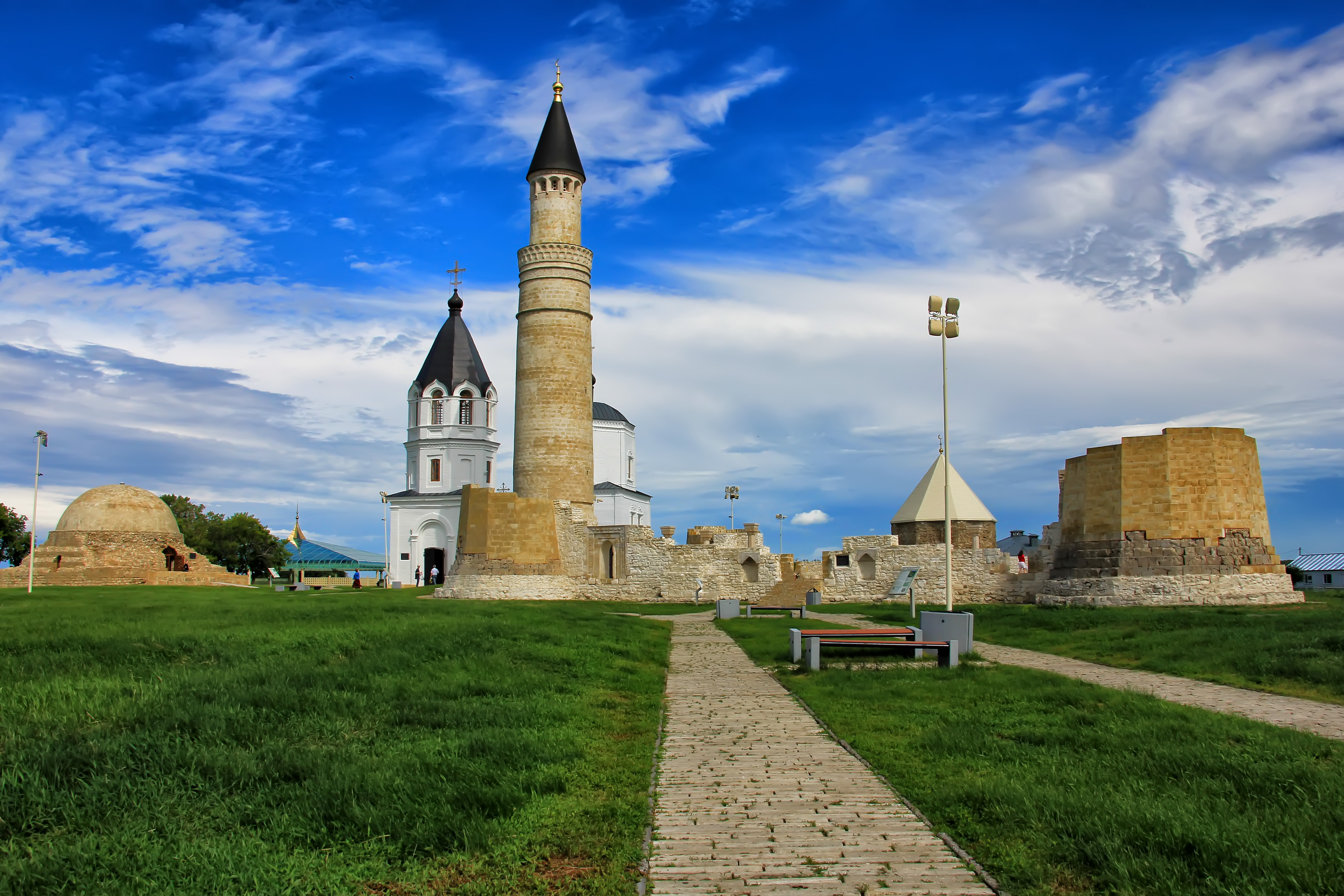 Комплекс памятников архитектуры XIII-XIV вв. на территории Булгарского городища (архитектурный комплекс Болгары): городище, Болгары, Спасский район, Татарстан